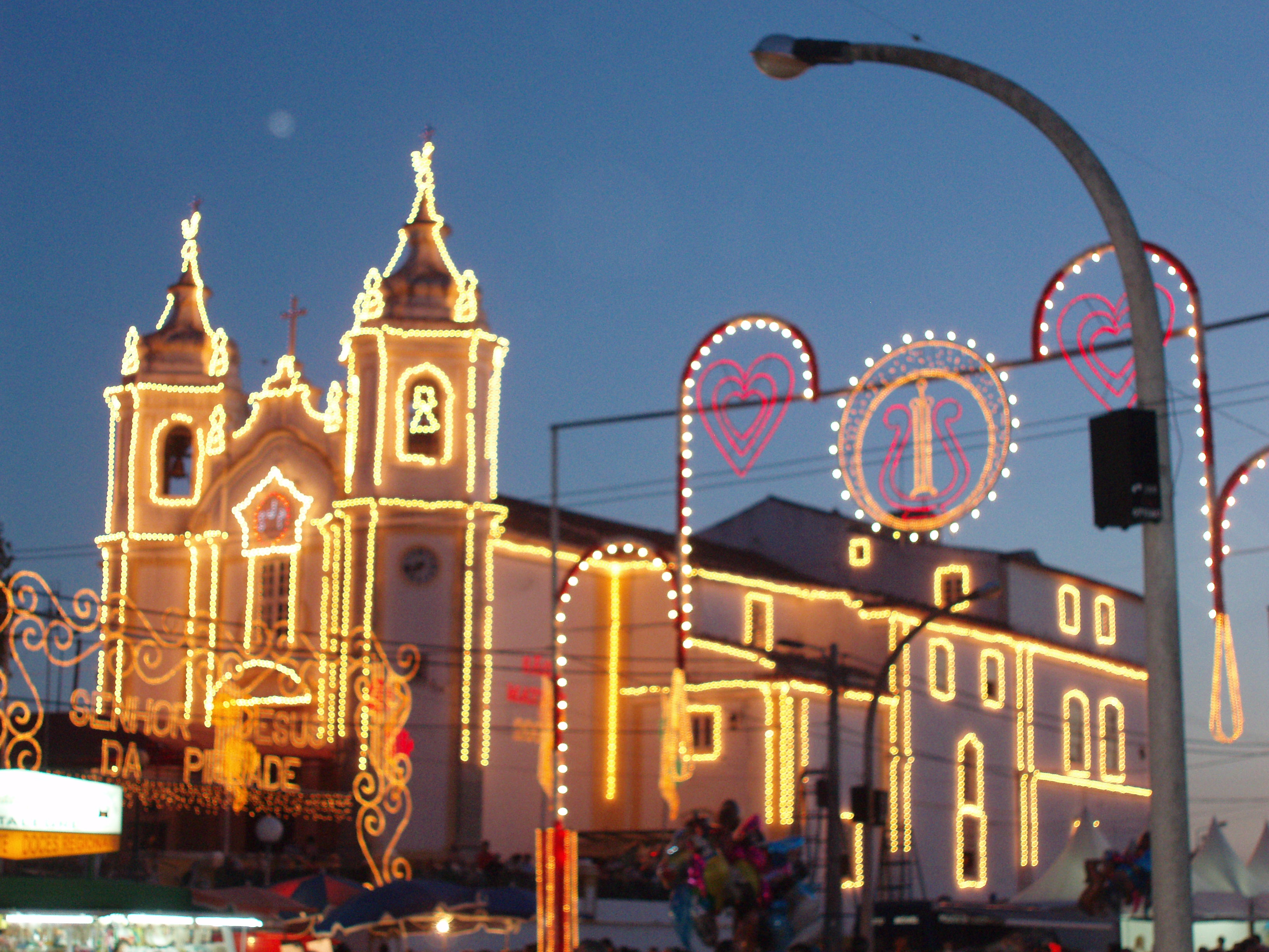 Santuário do Senhor da Piedade, Elvas, Portugal (século XVIII)